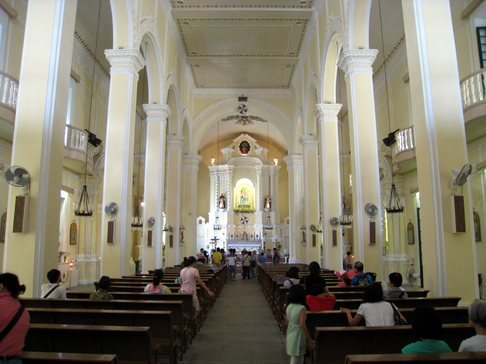 Igreja de Sao Domingos Interior 澳門玫瑰聖母堂